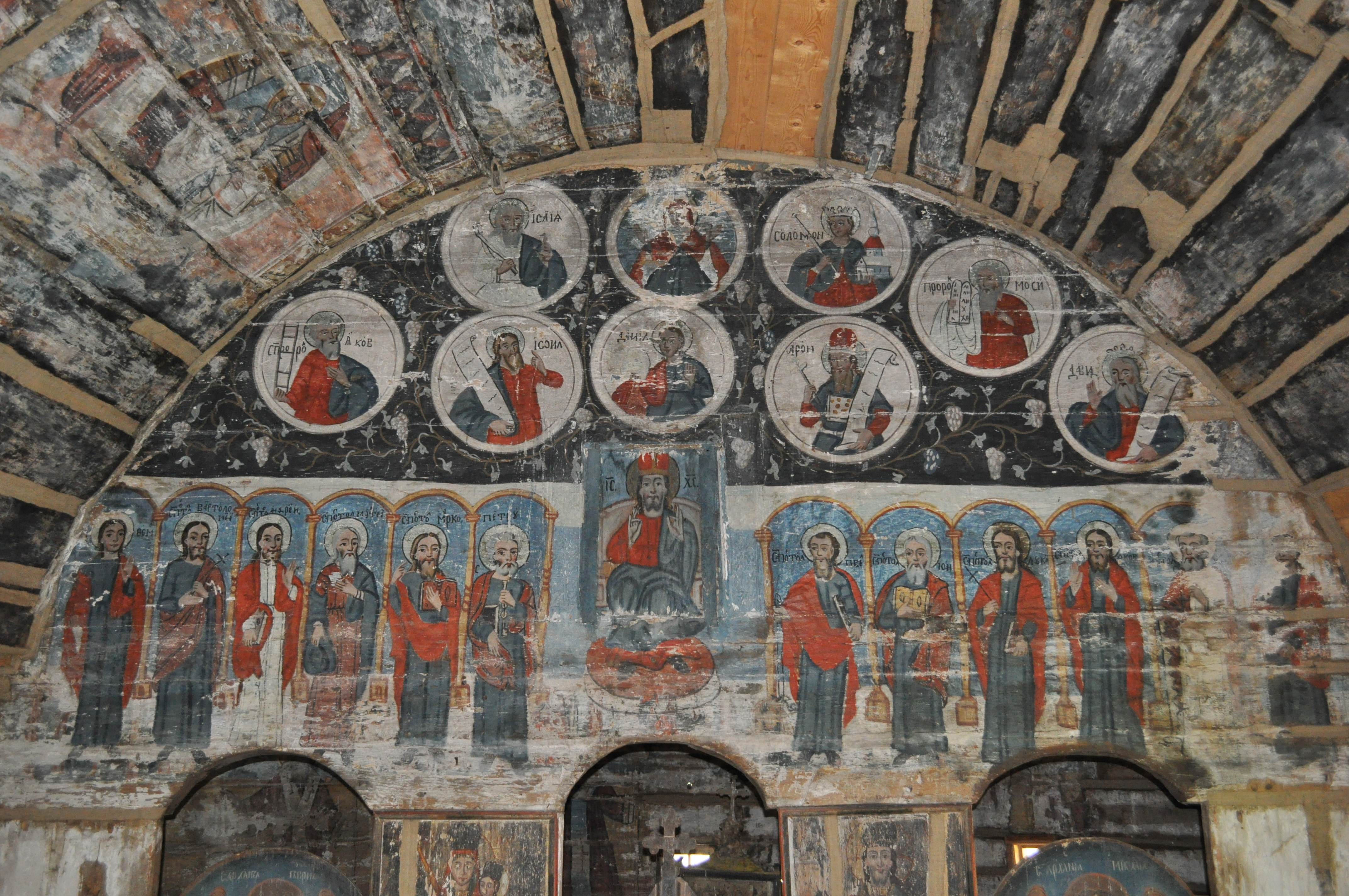 Biserica de lemn din Troaș